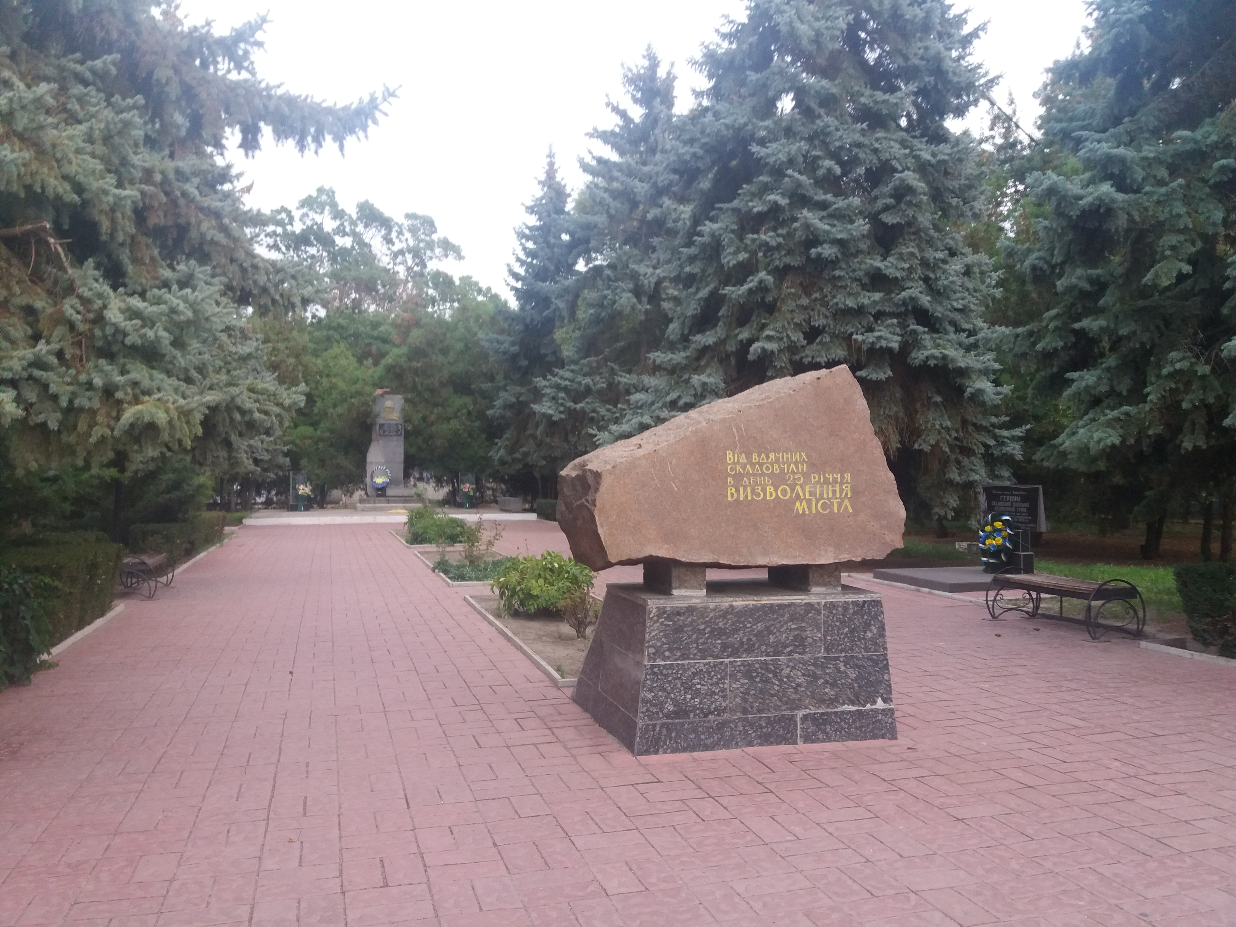 Пам?ятний камінь на честь визволення міста, Скадовськ